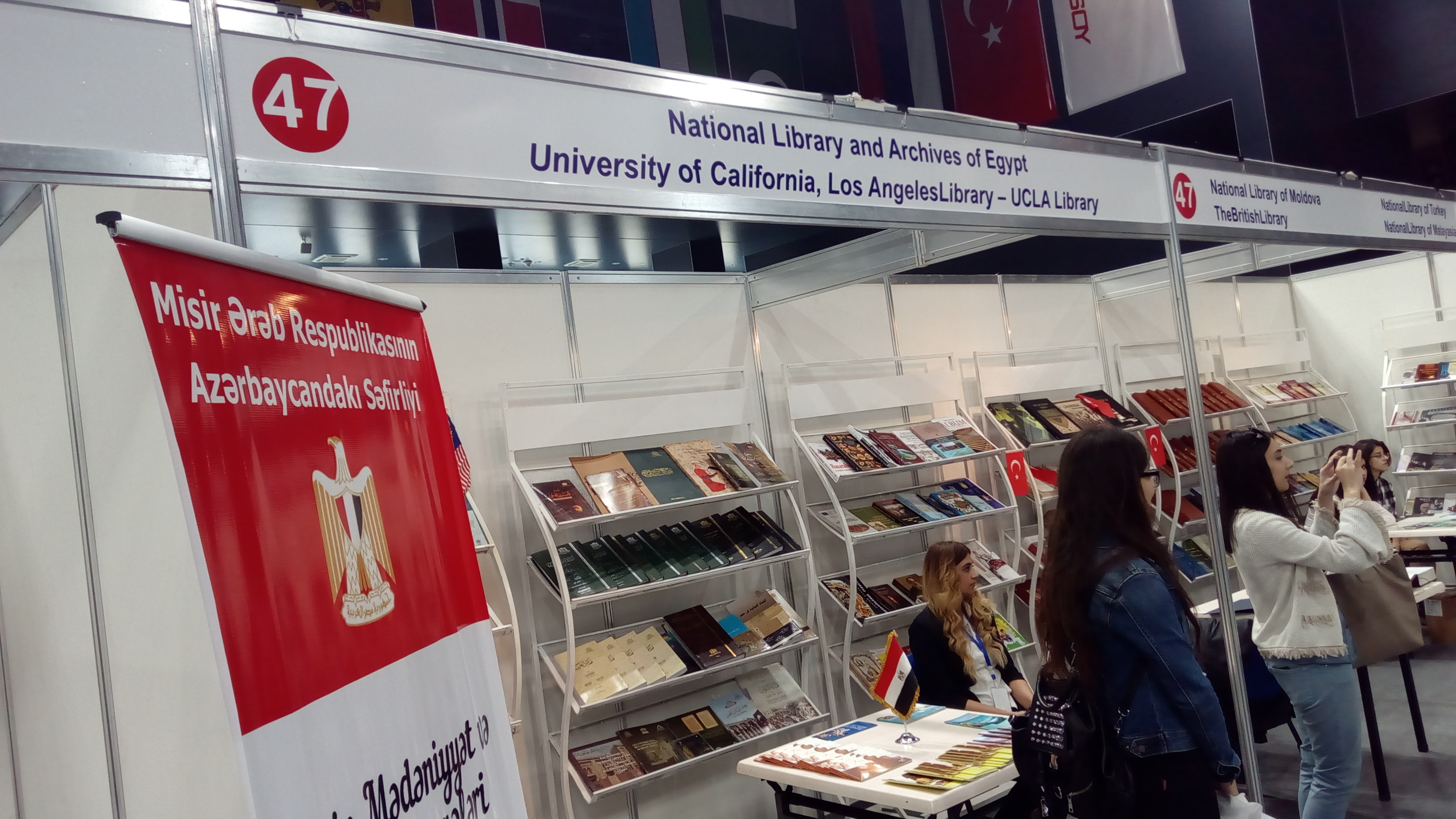 V Bakı Beynəlxalq Kitab Sərgi-Yarmarkası